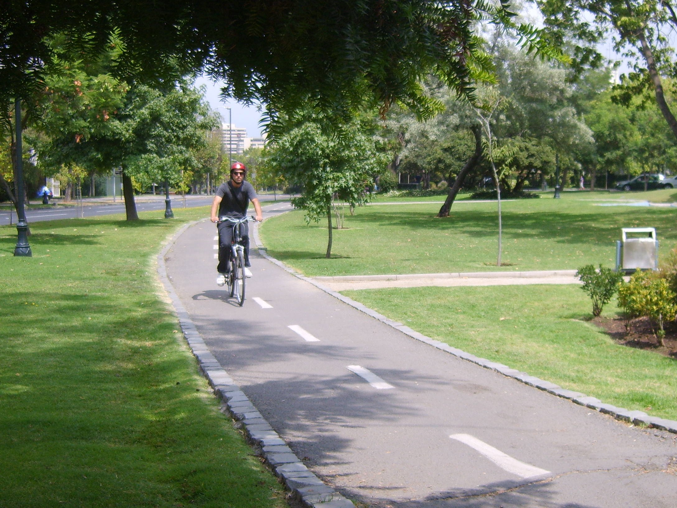 Ciclovía Pocuro, en Providencia, Chile